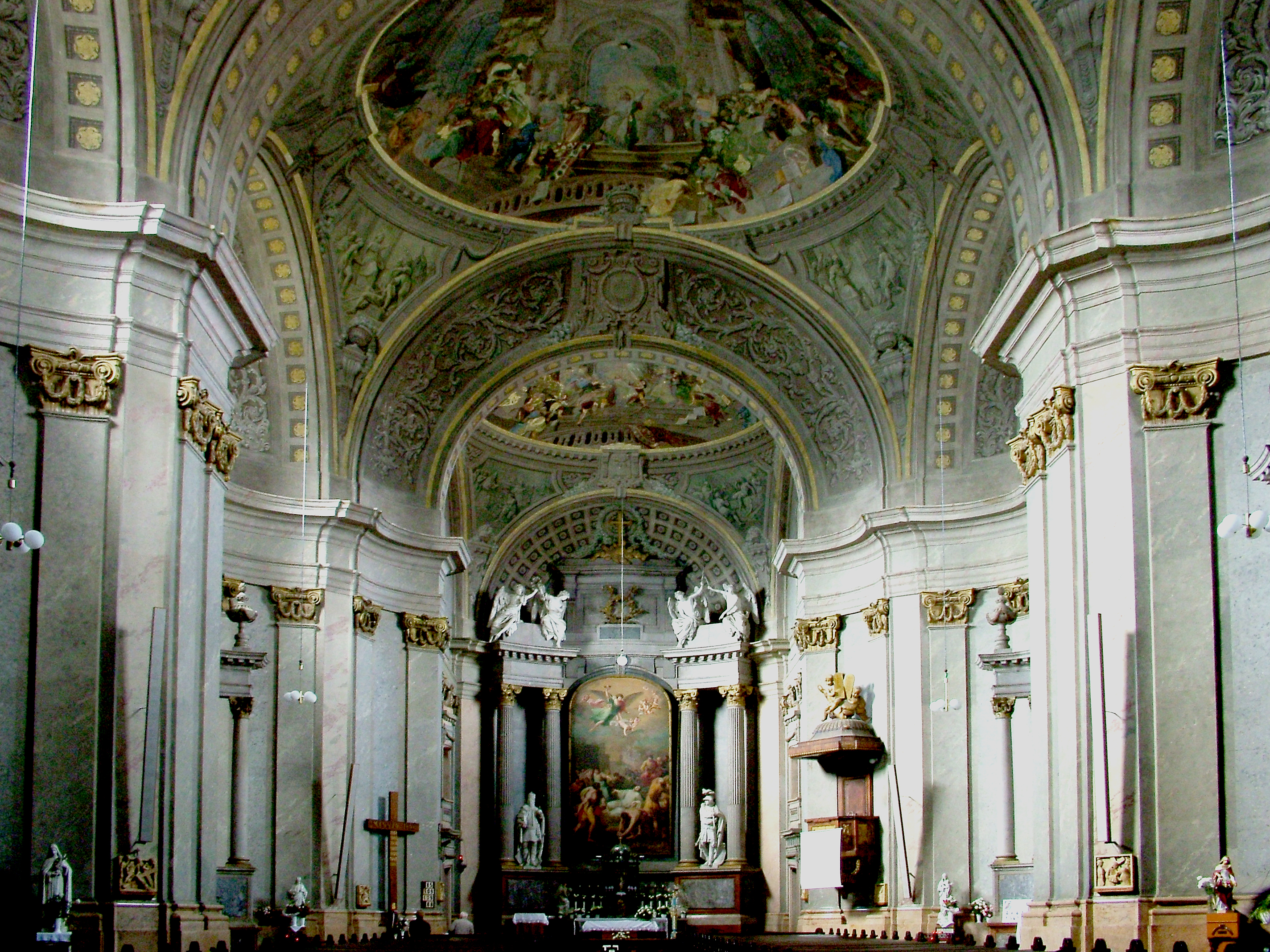 Pápa Nagytemplom: belső tér